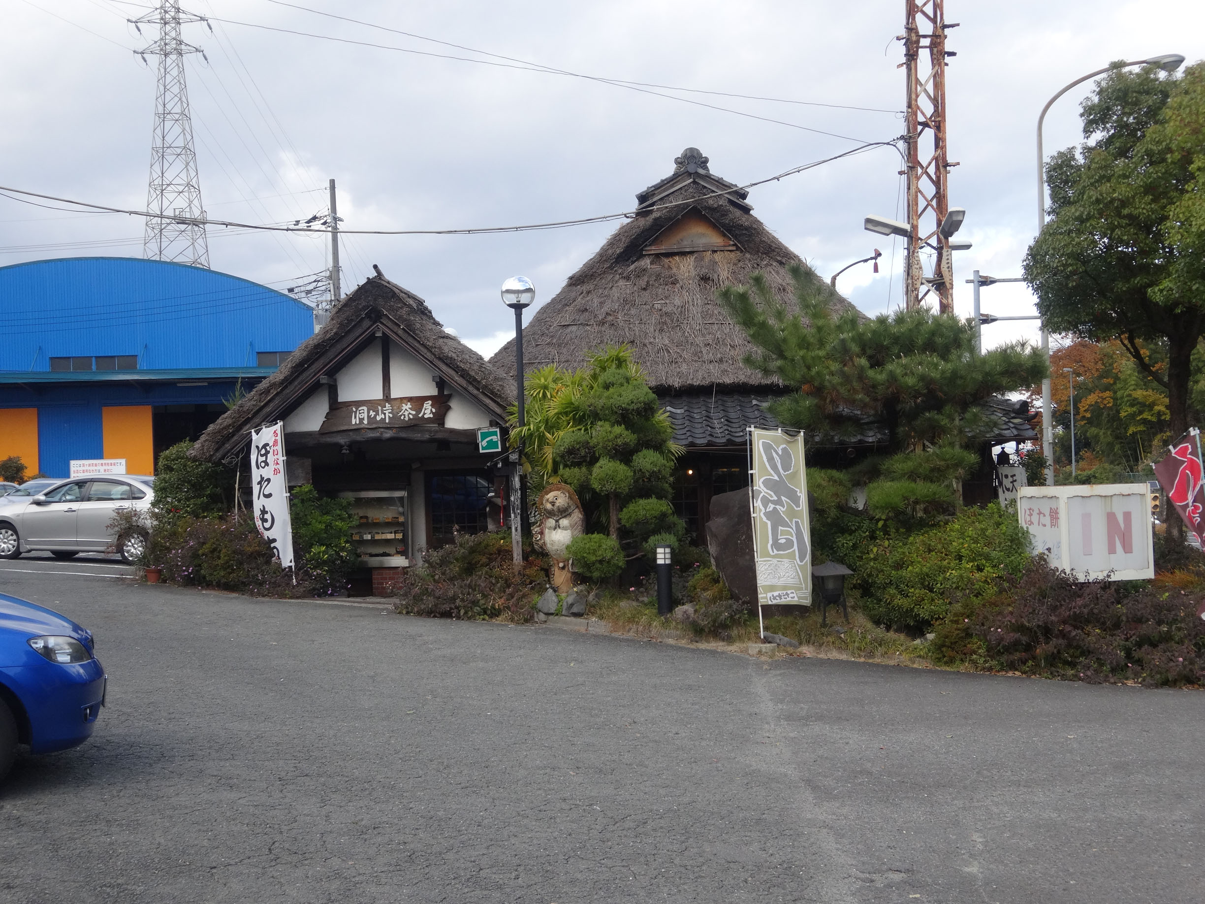 洞ヶ峠の茶店（京都府八幡市）